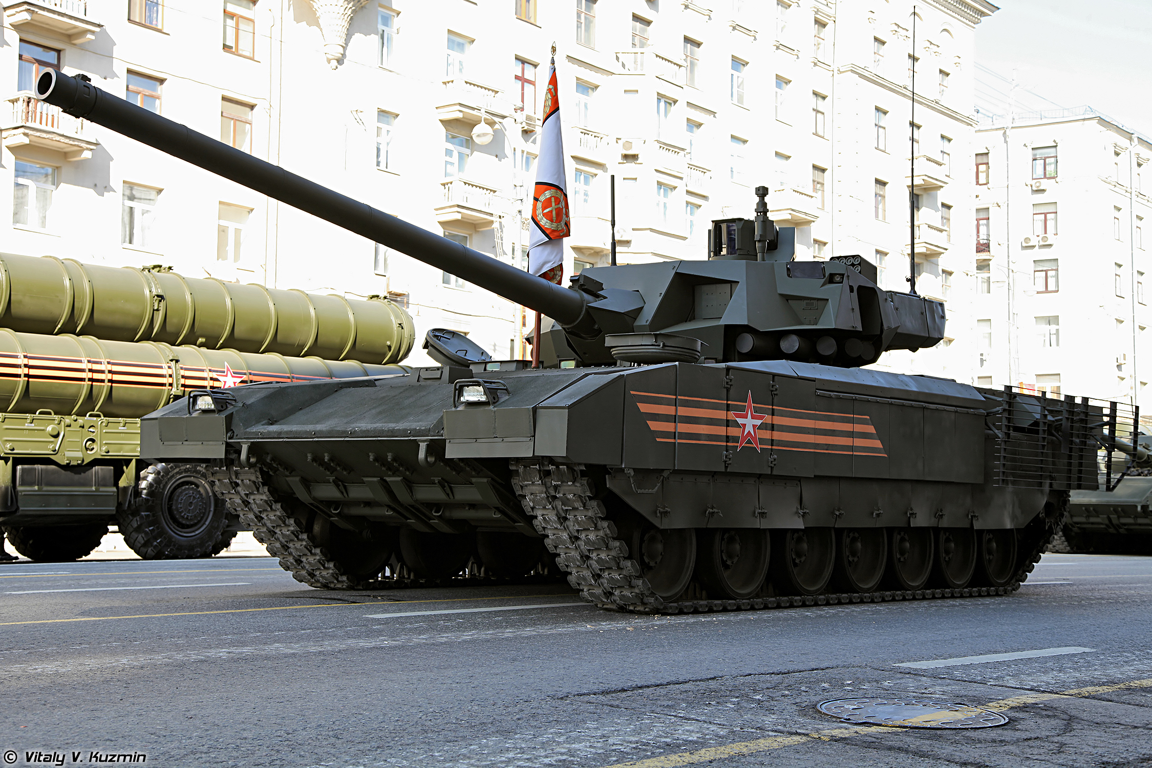 Танк Т-14 объект 148 на тяжелой гусеничной унифицированной платформе Армата (Main battle tank T-14 object 148 on heavy unified tracked platform Armata)